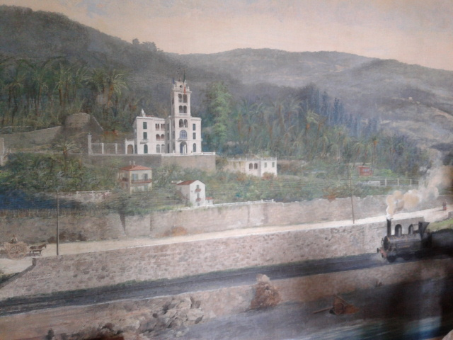 Immagine dell'affresco della Cage aux lions, con veduta della Villa Garnier, Bordighera